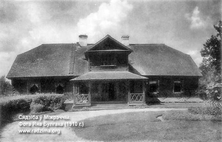 Сядзіба ў Міжрэччы. Фота Я. Булгака. 1910 г.Беларуская (тарашкевіца): Міжрэчча (Mižrečča), сядзіба Мірскіх (Mirski)